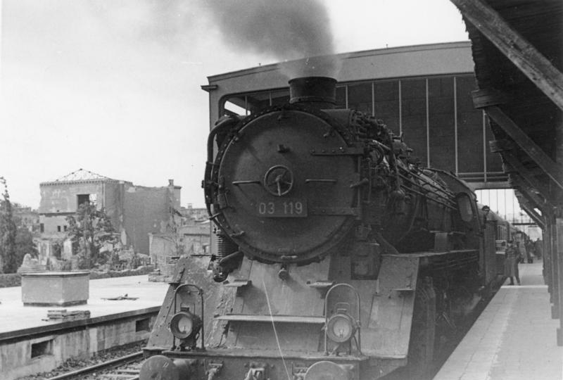 Berlin. Der Fernverkehr ist auch wieder in Gang. Hier verlässt der Express-Berlin-Halle den Bahnhof Zoo. ADN-ZB/Vitanova Berlin um 1946: Wiederbeginn des fernverkehrs. Der Express berlin - Halle verläßt den Bahnhof Zoo. 5222-50